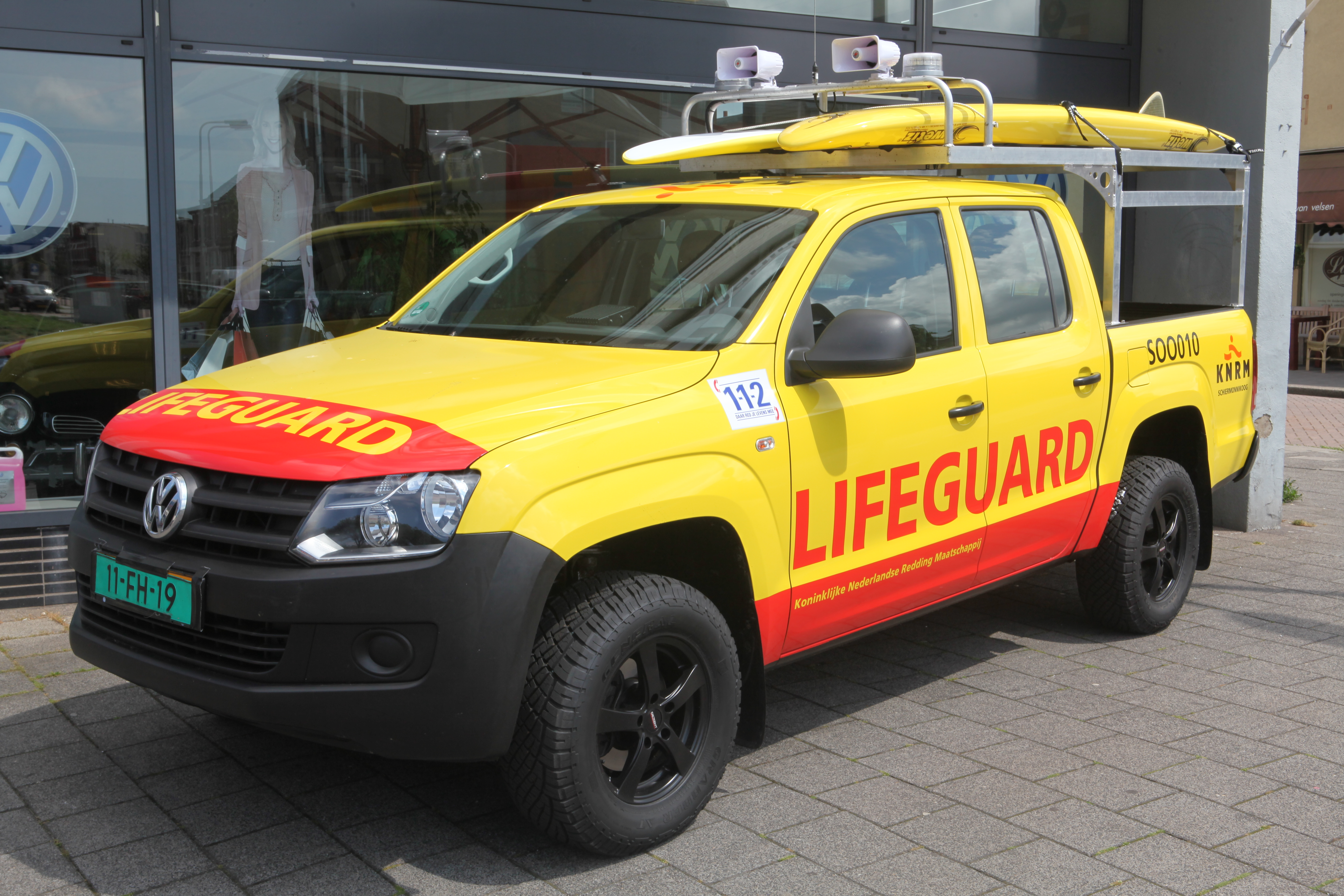 KNRM Lifeguard Schiermonnikoog Volkswagen Amarok